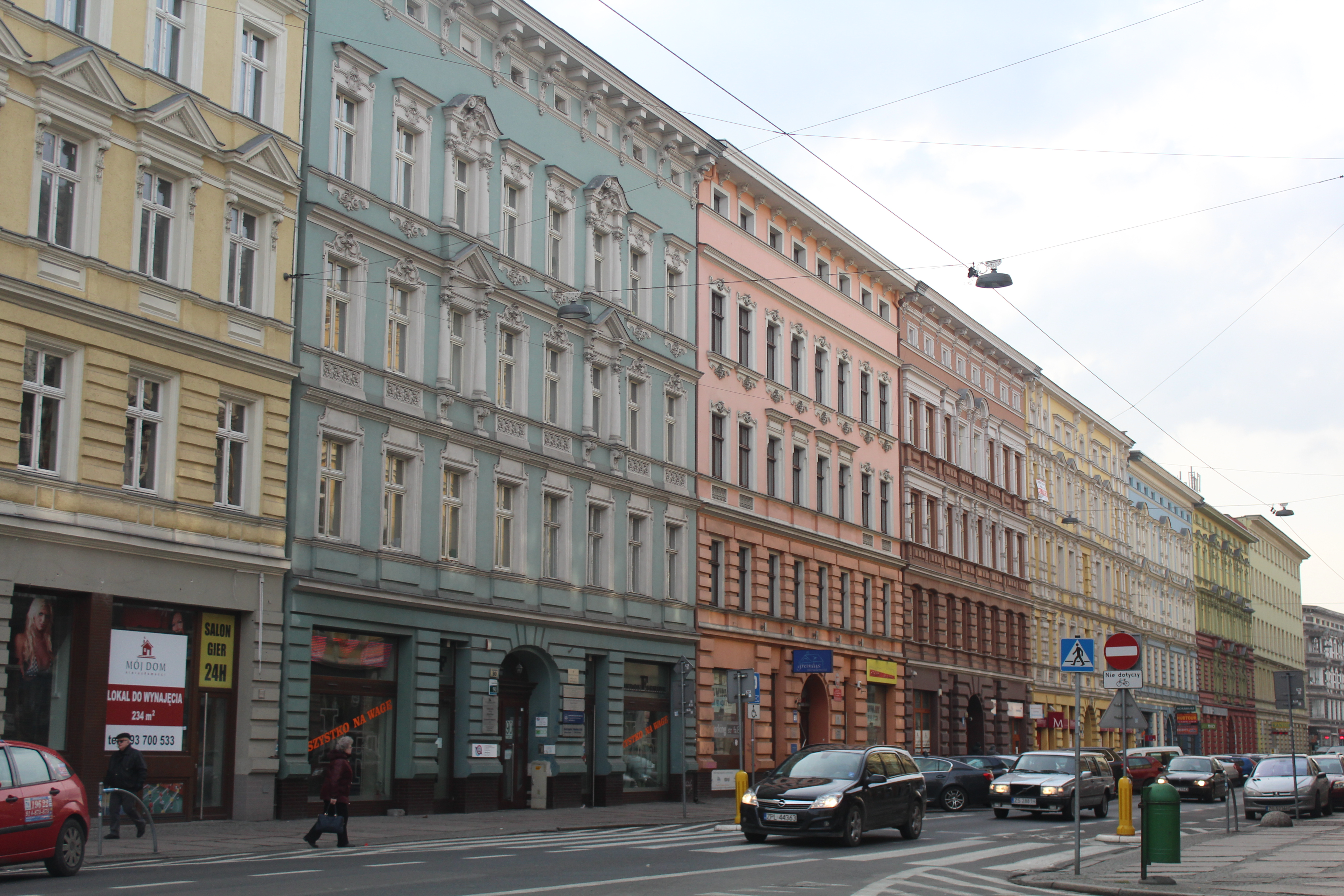 Ulica Jagiellońska w Szczecinie